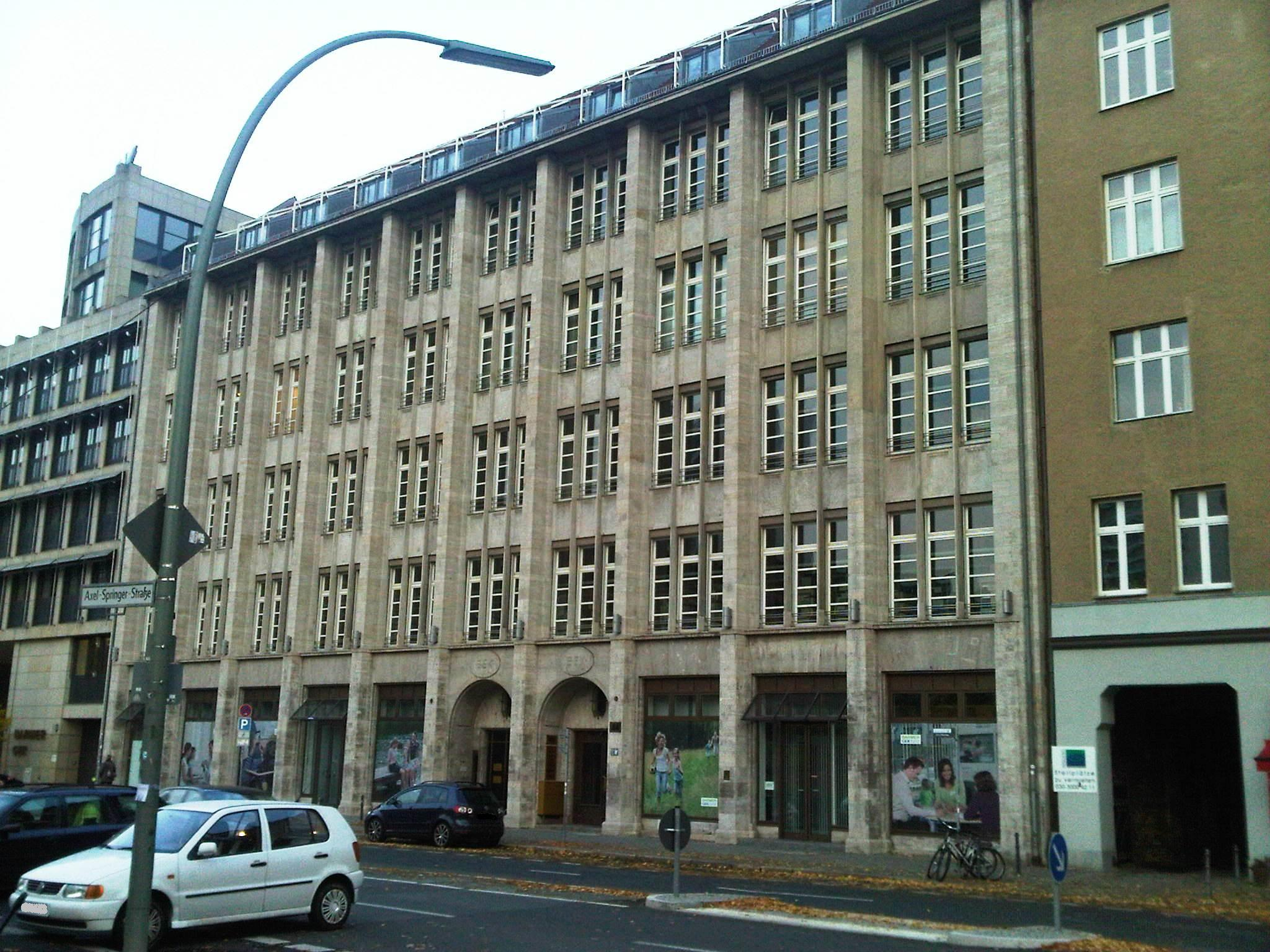 Denkmalgeschütztes Gebäude der Barmer GEK in der Axel-Springer-Straße in Berlin-Kreuzberg, Architekt Hans Bernoulli